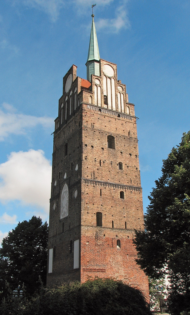 Beschreibung: Kröpeliner Tor in Rostock / Germany Fotograf: Darkone, 17. August 2005